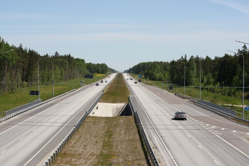 Tallinn–Narva maantee pildistatud Jägala lähedal sillalt.